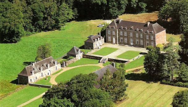 Château de léhélec